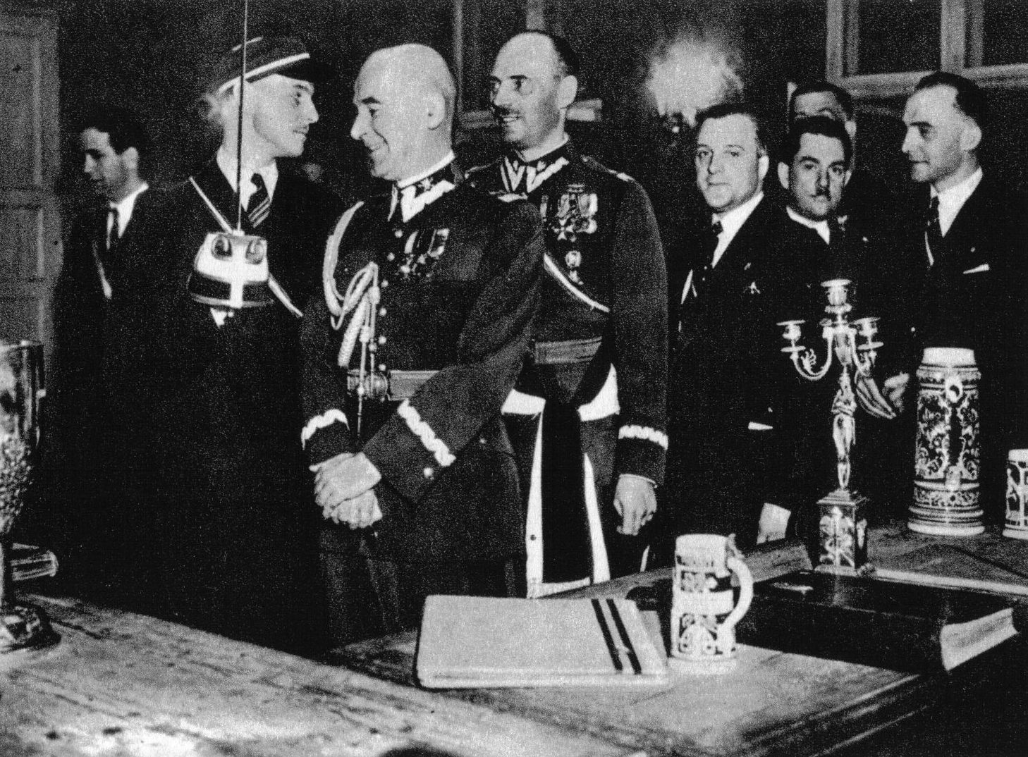 Marszałek Edward Rydz-Śmigły z korporantami z "Arkonii". Za marszałkiem generał Władysław Anders. Fotografia z tygodnika Światowid.